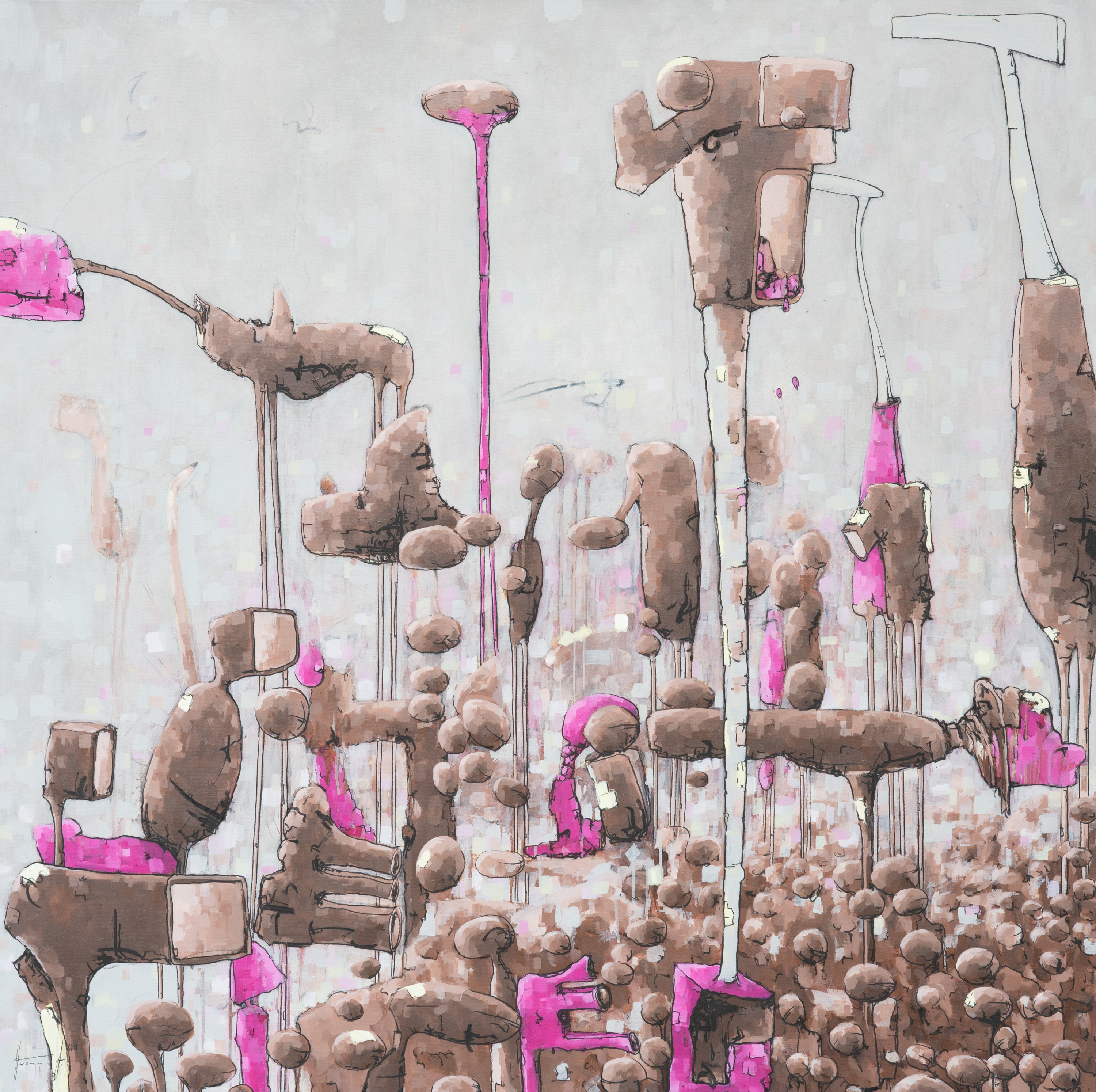 Acryl auf Leinwand 150x150cm